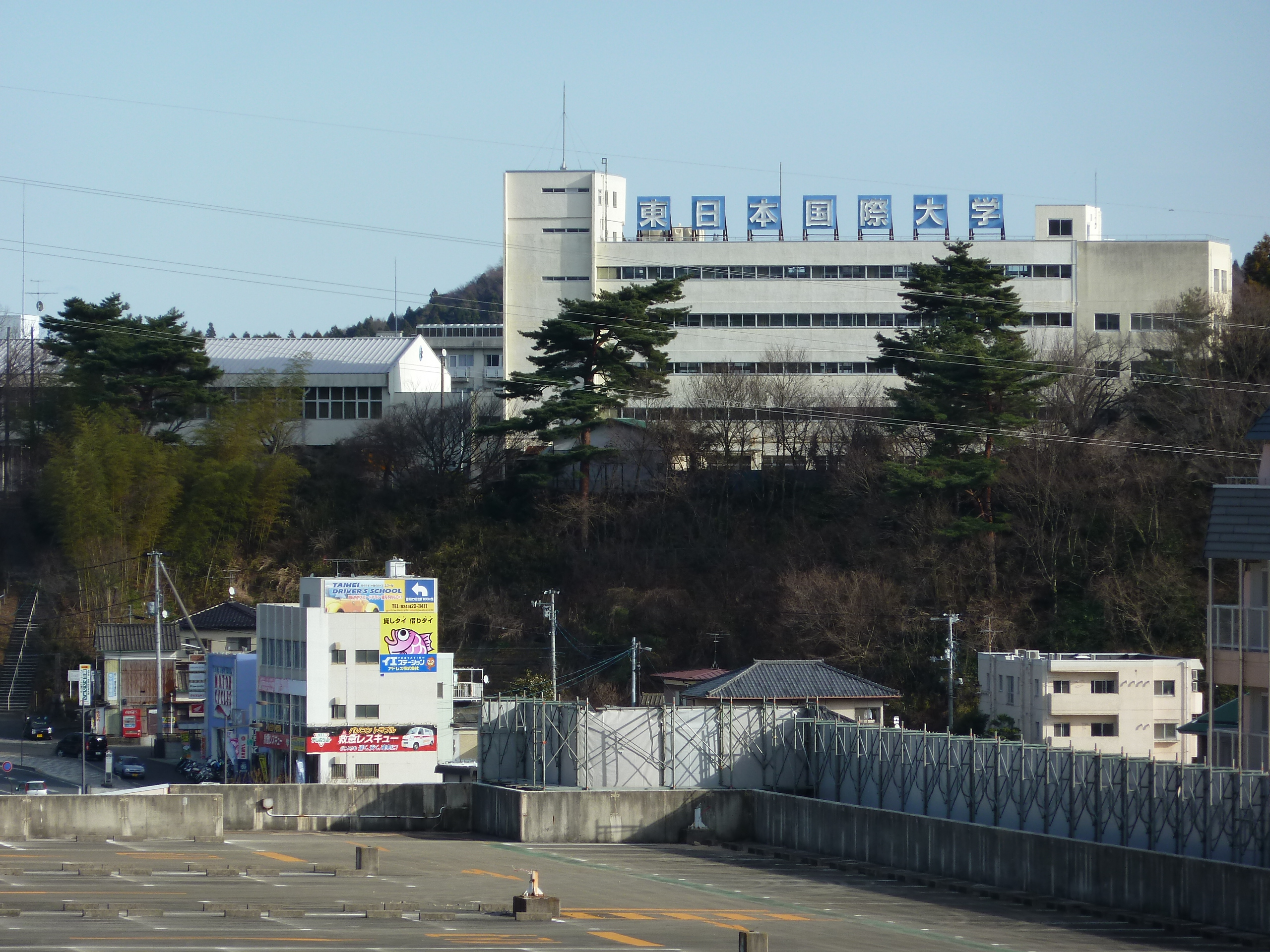 東日本国際大学